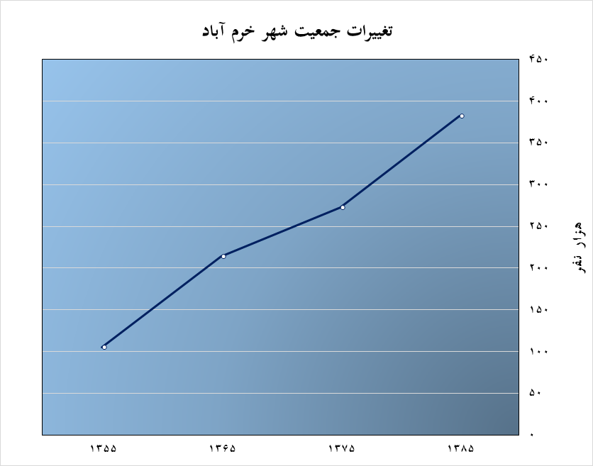 تغیرات جمعیت شهر خرم آباد